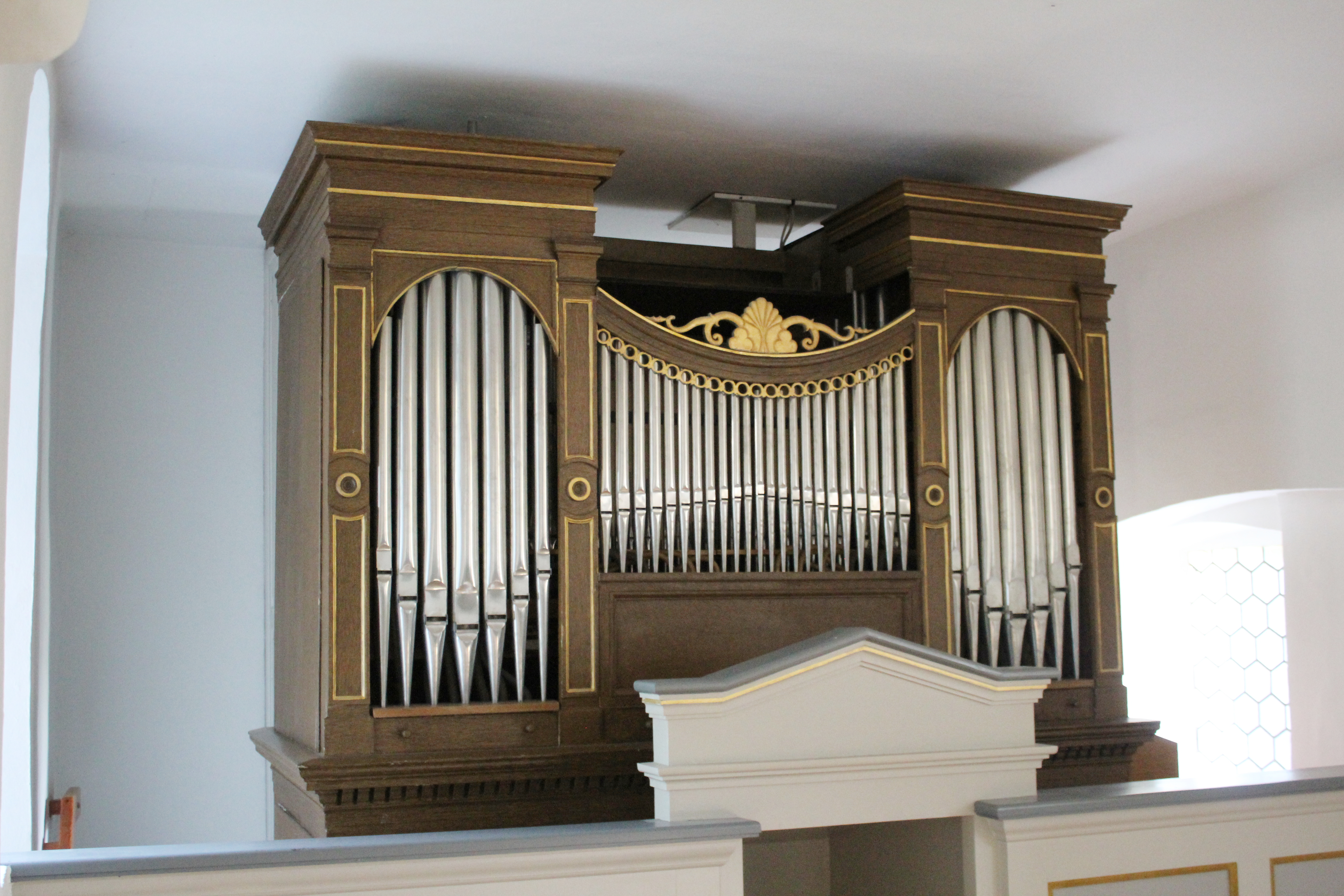 Evangelische Kapelle Oberndorf, Solms, Hessen, Deutschland